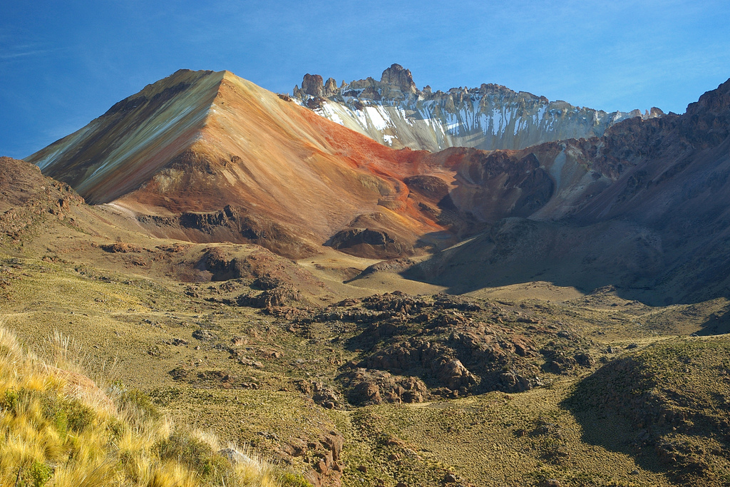 volcán Tunupa ubicado el borde del Salar de Uyuni, en el departamento de Oruro al oeste de Bolivia.